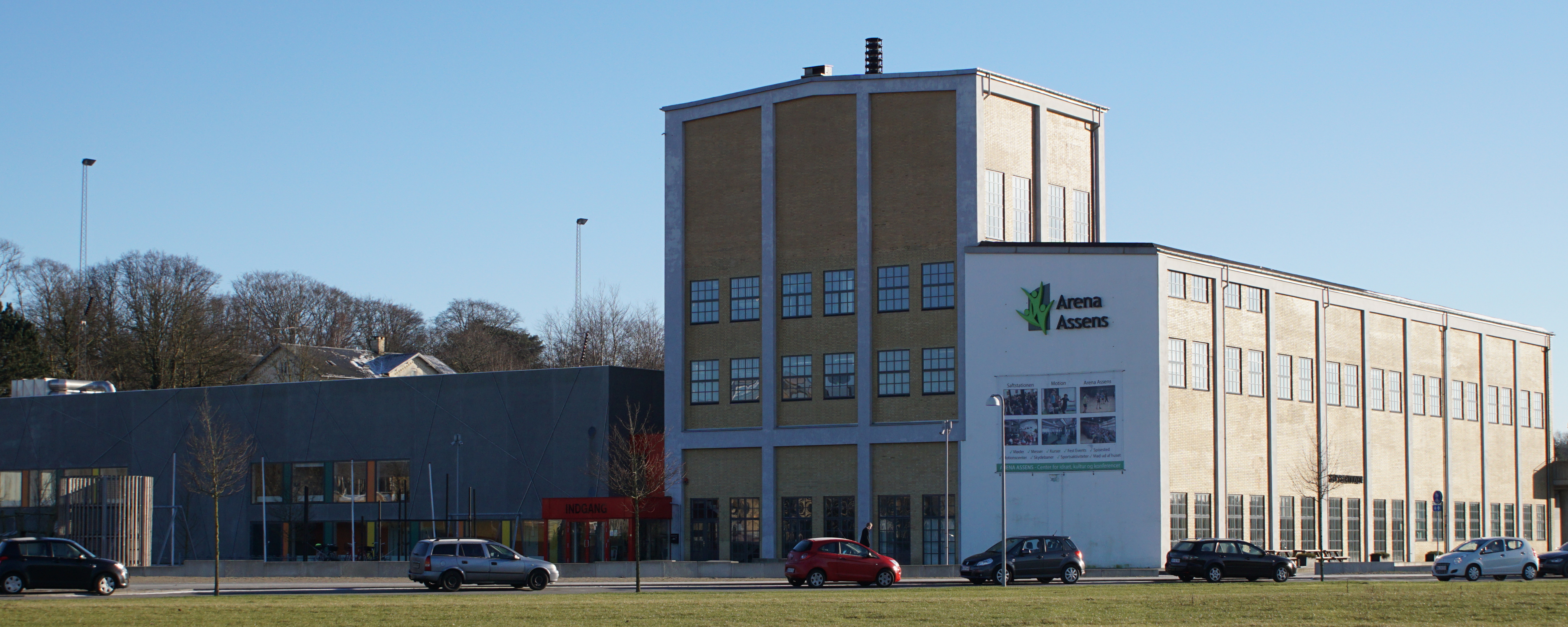 Arena Assens.